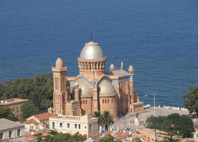 notre dame d'afrique alger bouzareah [1]